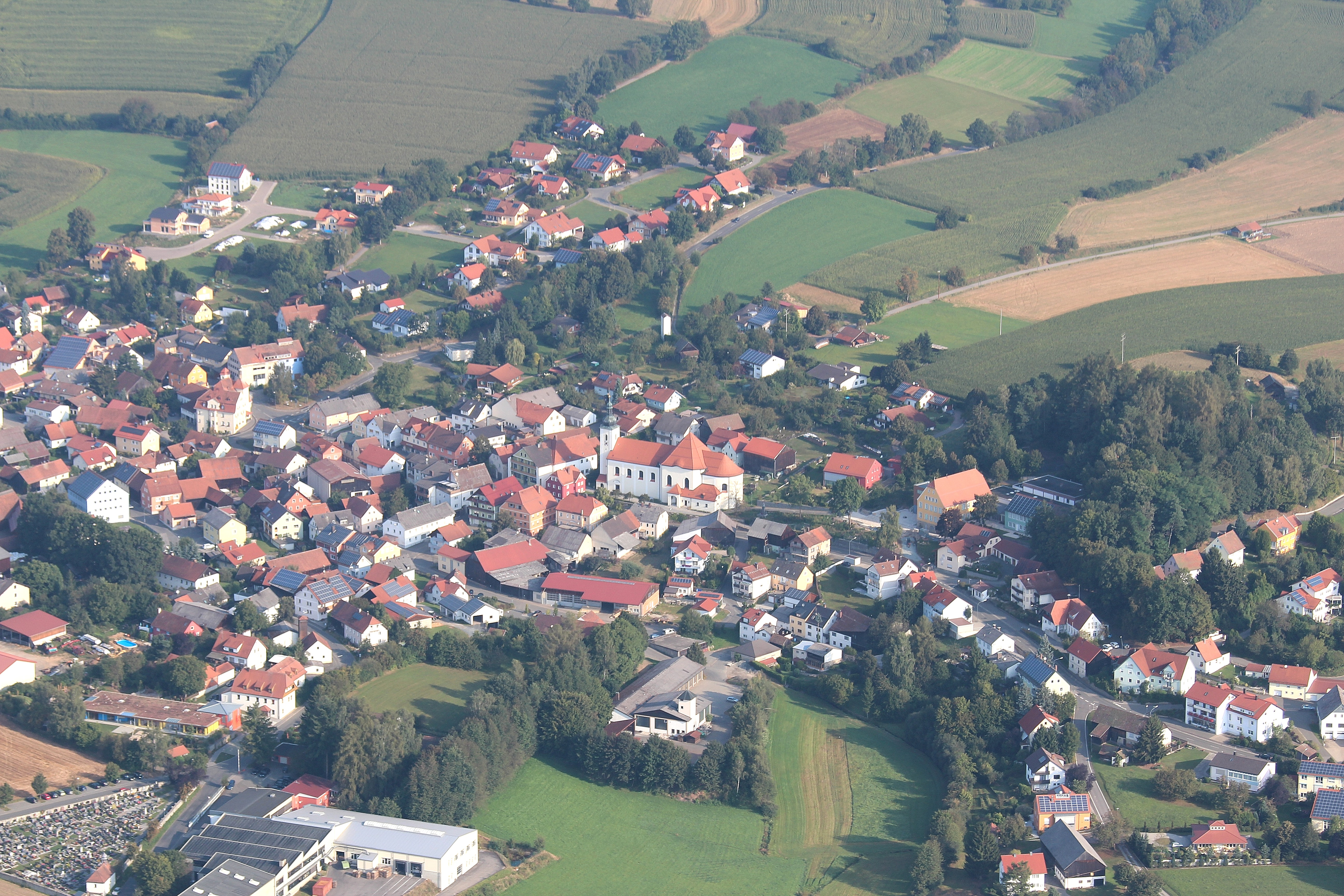 Tiefenbach, Landkreis Cham, Oberpfalz, Bayern